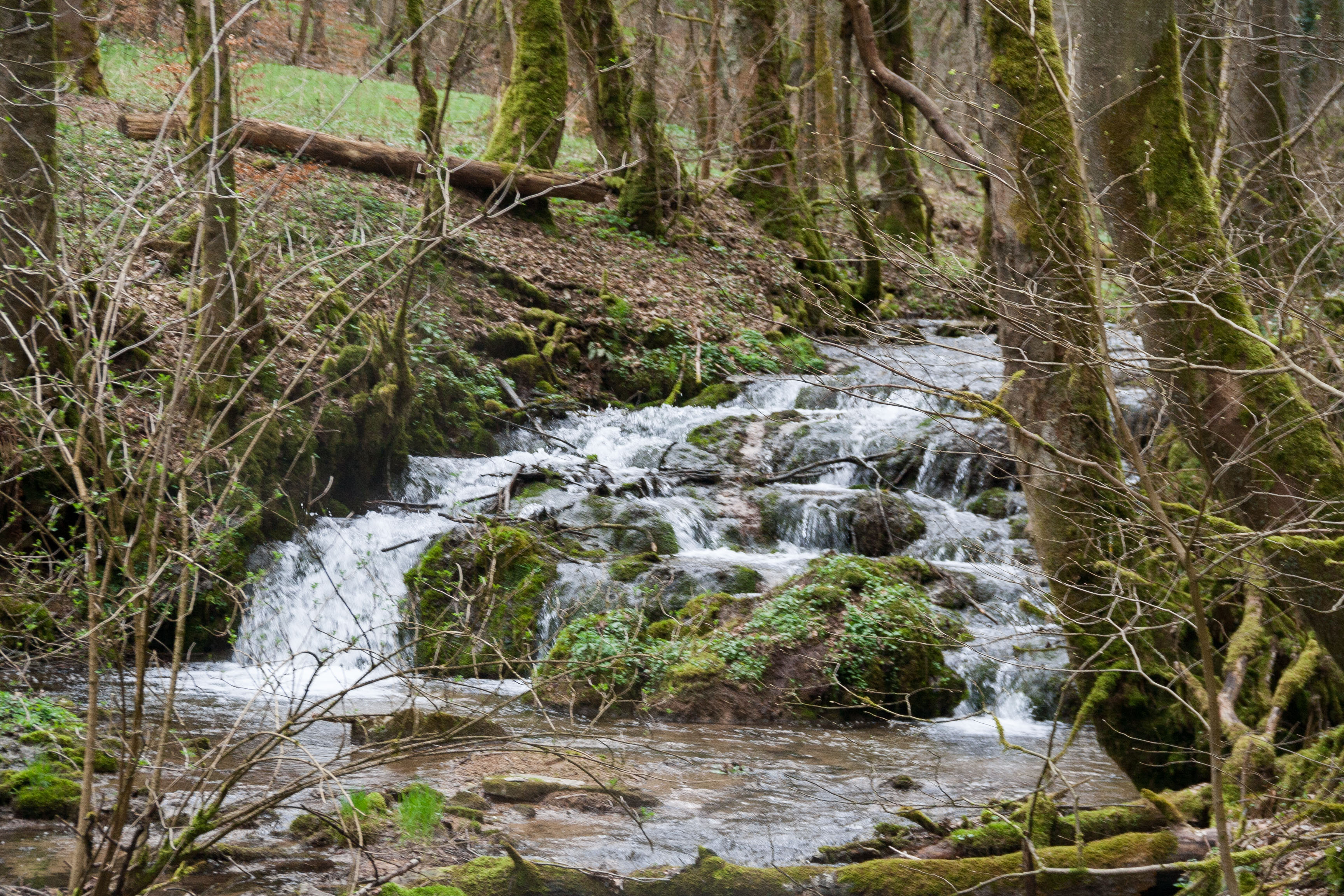 Landschaftsschutzgebiet Rohrenstädter Bachtal, Oberrohrenstadt, Berg bei Neumarkt